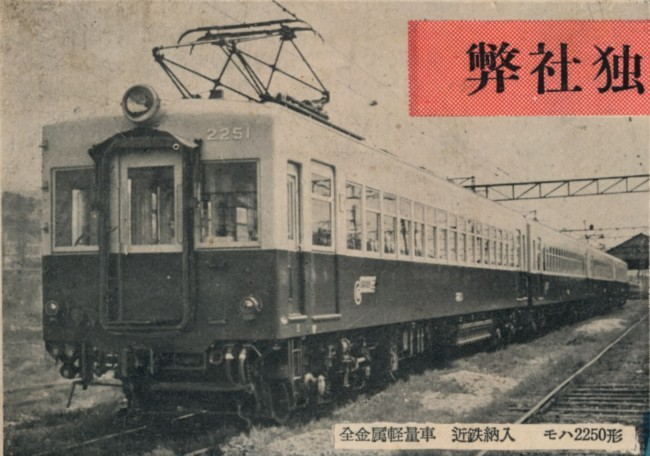 近鉄2250系